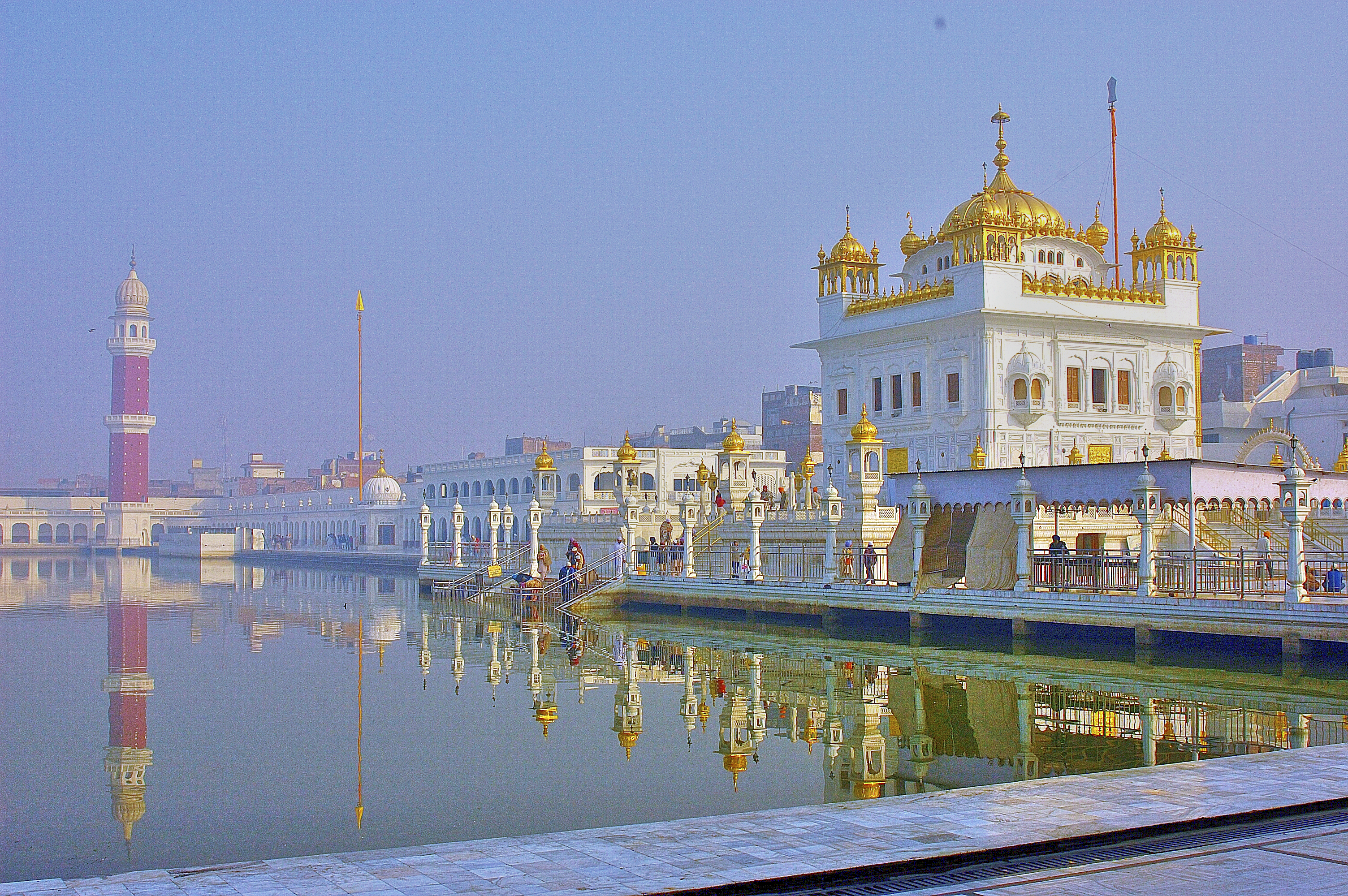 The Sarovar besides the GurudwaraTarn Taran Sahib, Punjab, India.